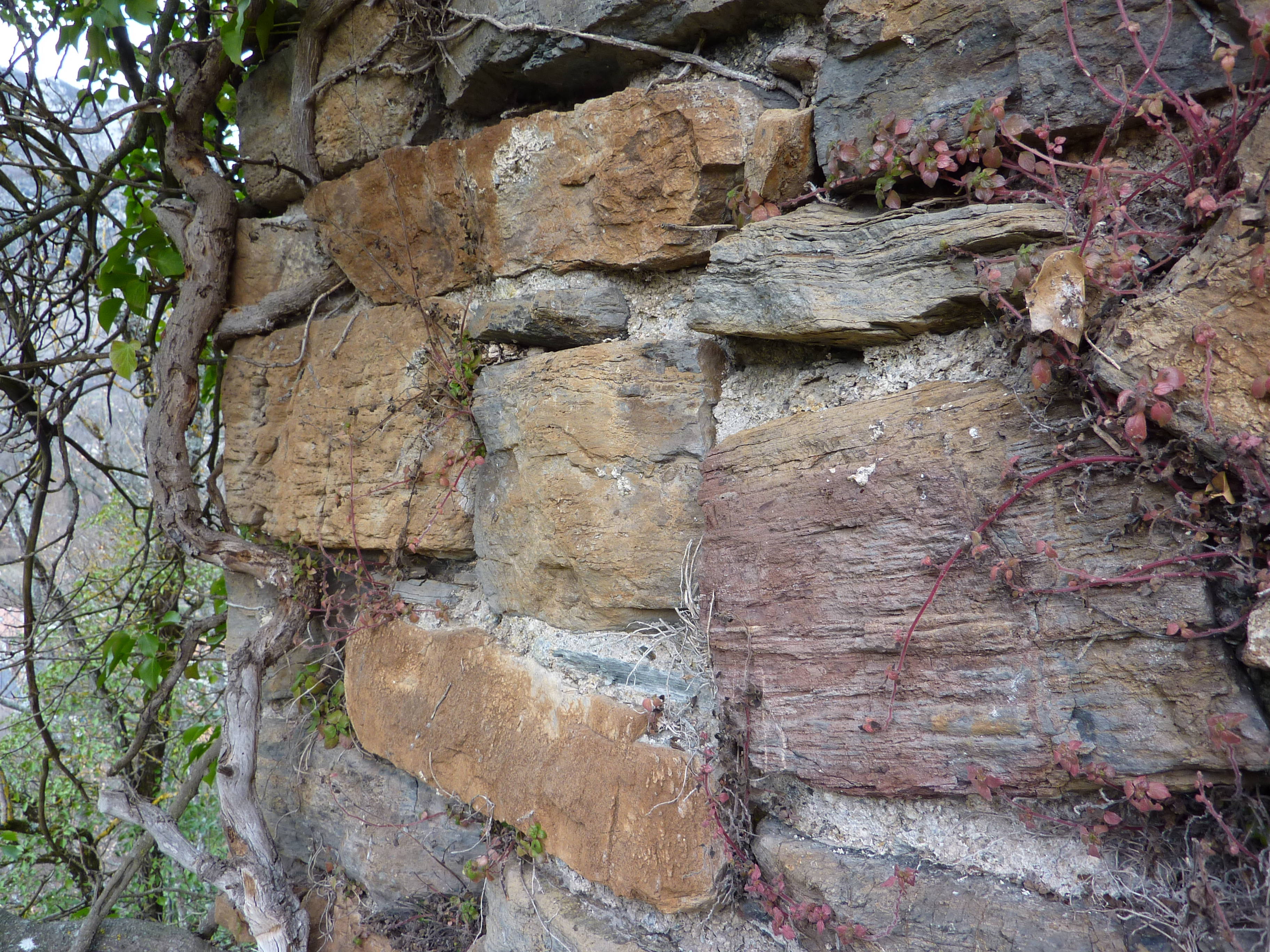 Vue du château fédal